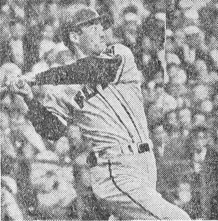 1960年日米野球張本勲